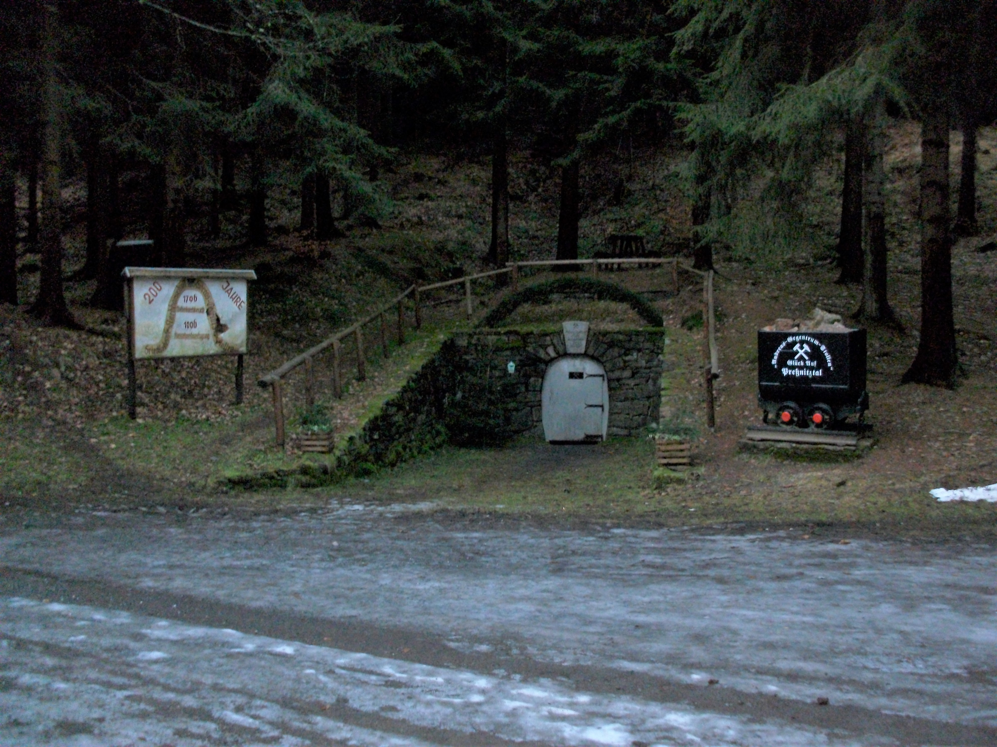 Andreas-Gegentrum-Stolln (2017)